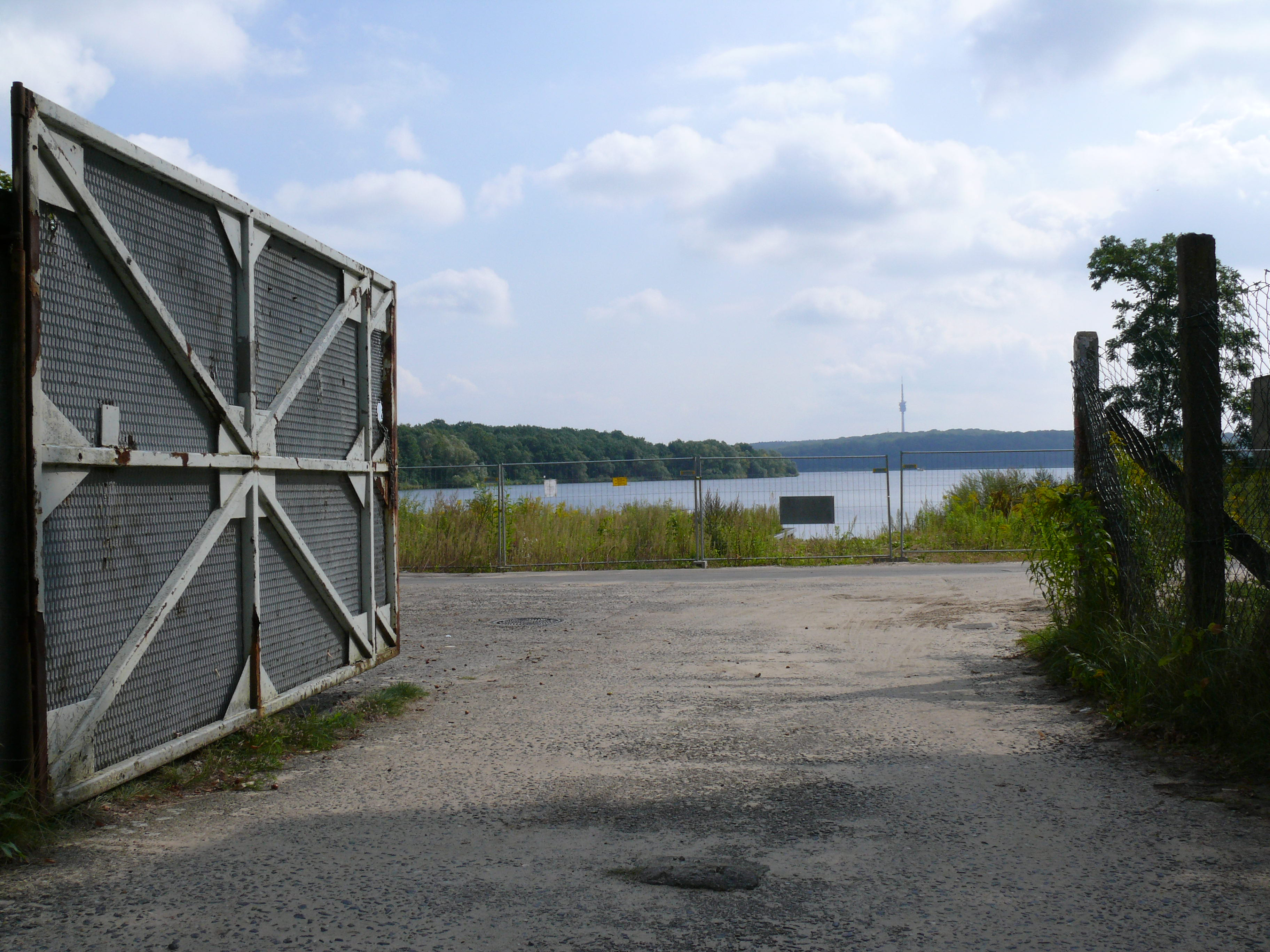 Blick zum Jungfernsee, Potsdam, Bertinistrasse 6-9, 2007